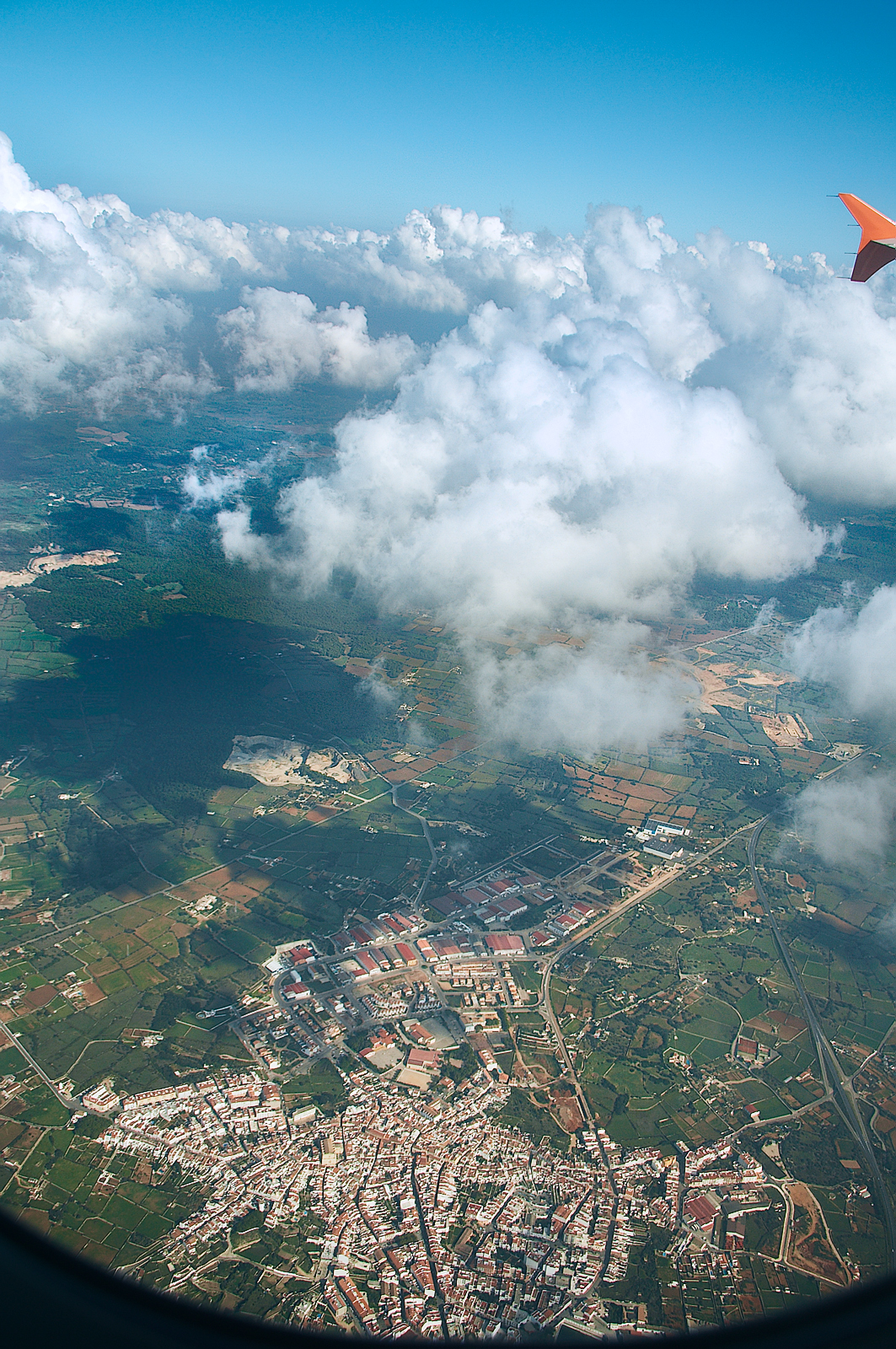 Alaior, cota 1.215